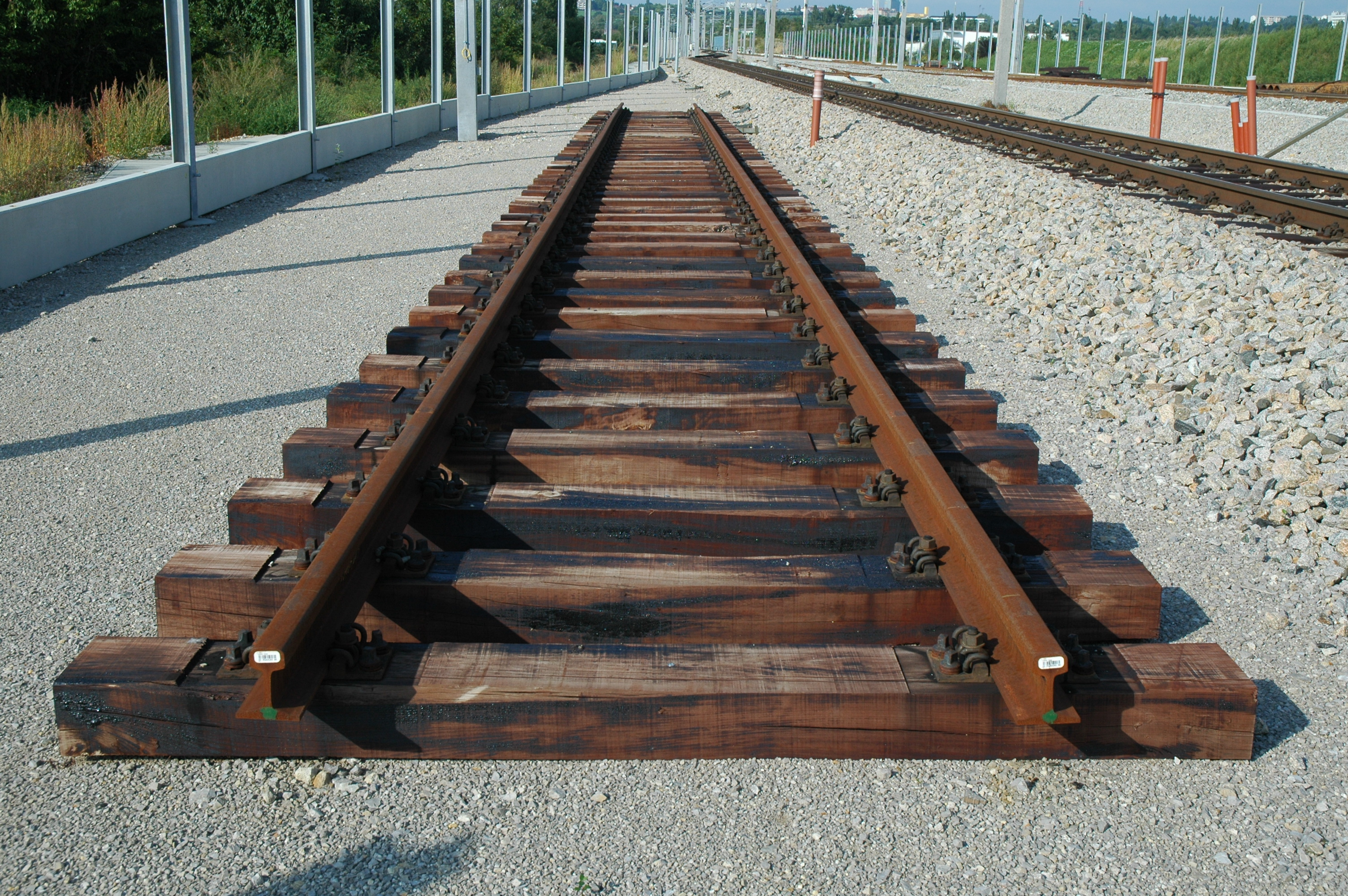 vorgefertigter Gleiskörper: Vorgefertigte Eisenbahnschienen mit Schwellen, rechts davon die Baustelle